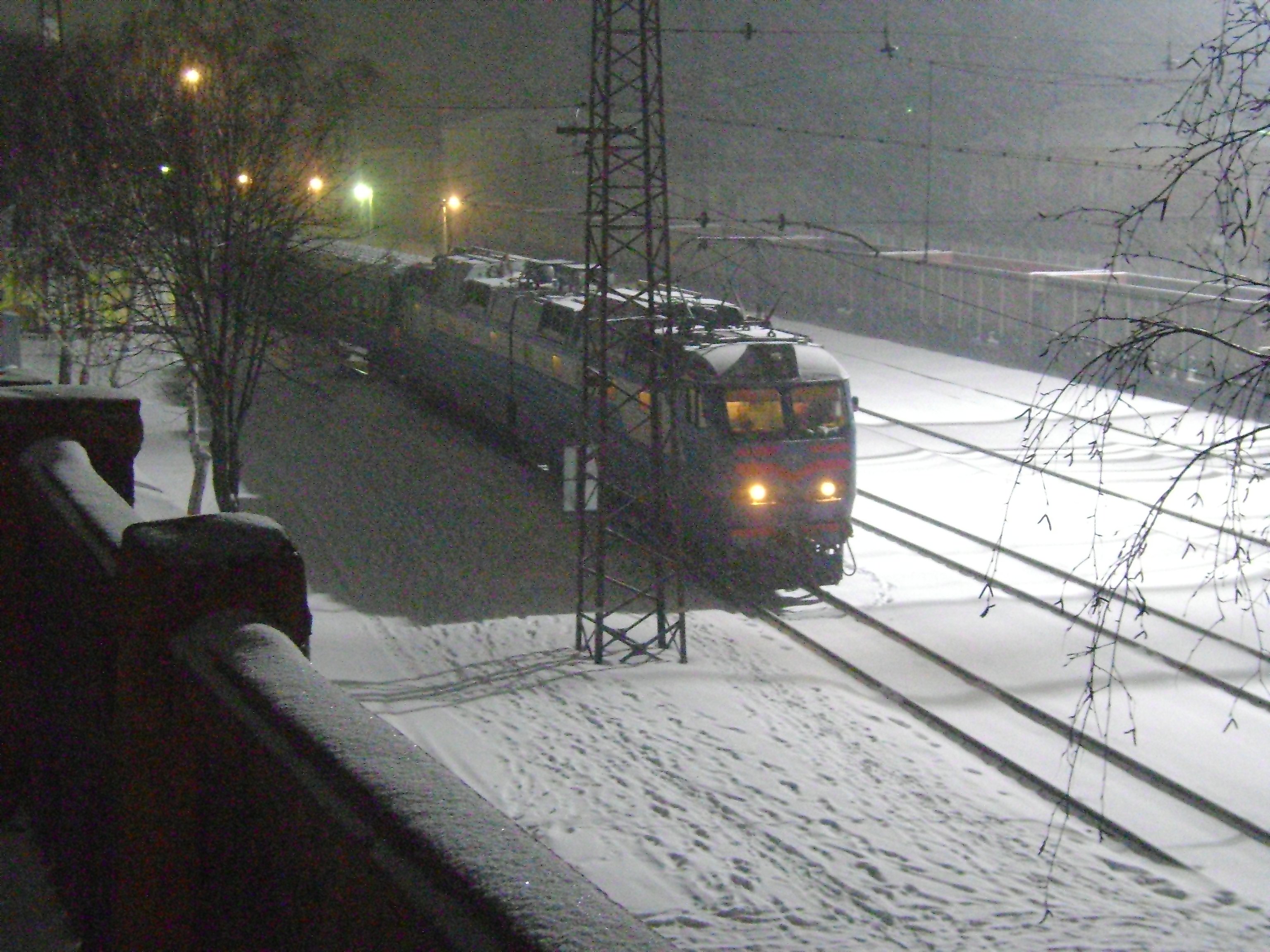 Електровоз ЧС7 на станції Лозова.jpg: Електровоз ЧС7 на станції Лозова